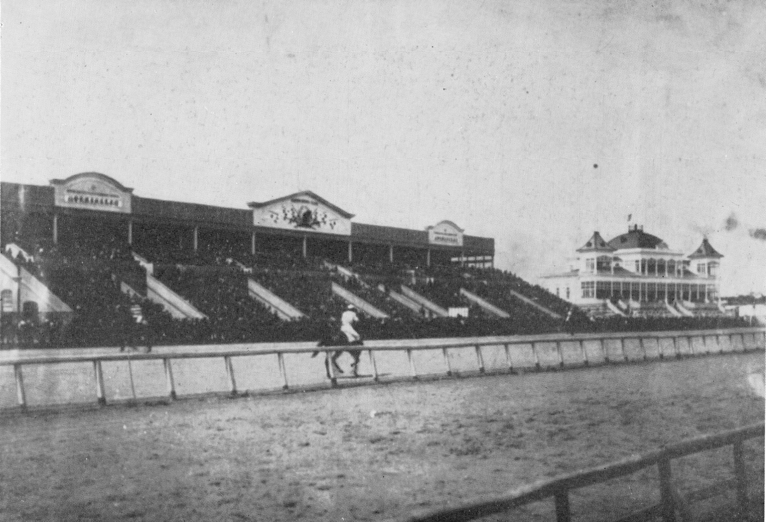 京浜競馬倶楽部川崎競馬場 1907年(明治40年)